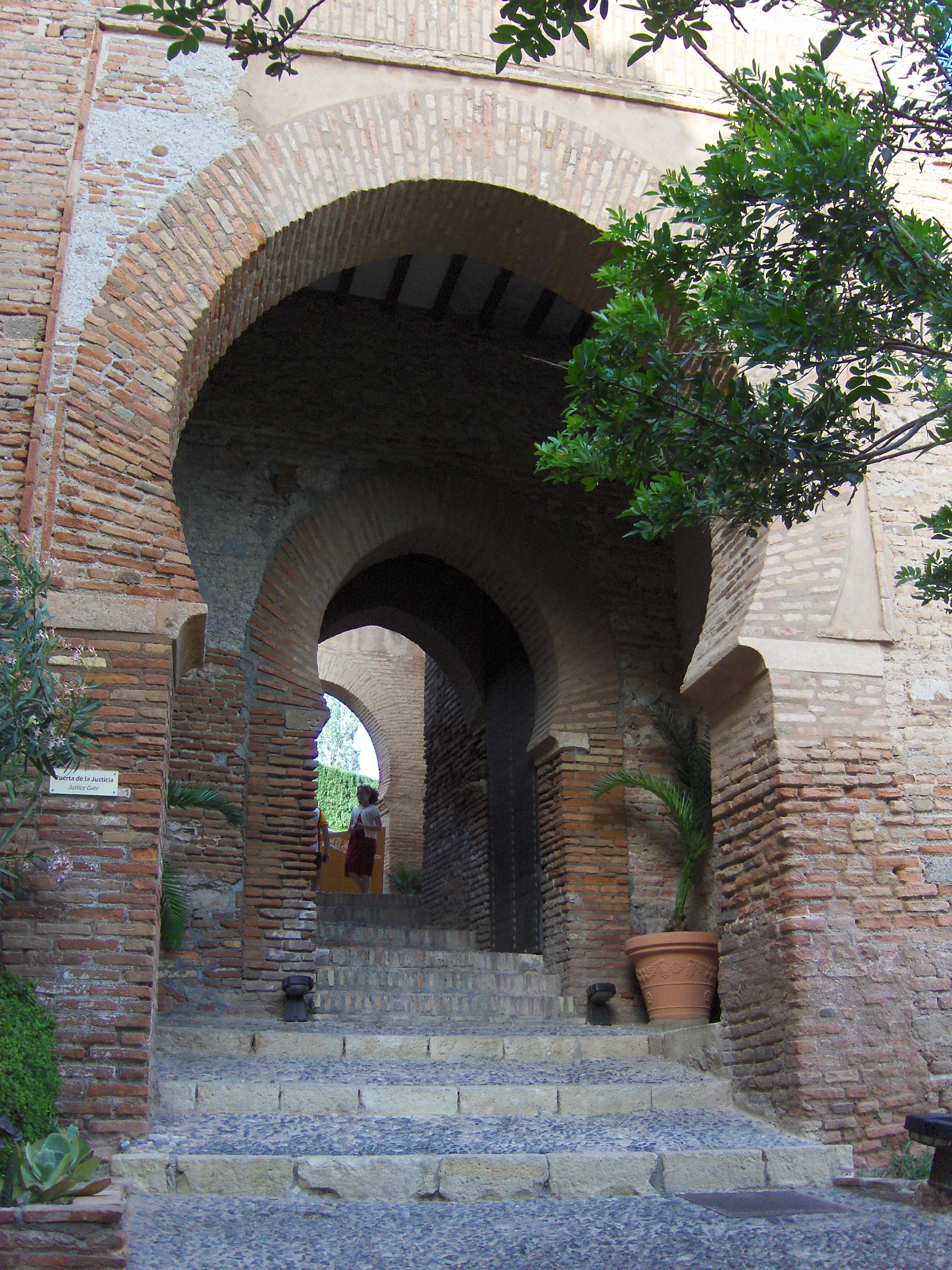 Puerta de entrada superior a la Alcazaba de Almería